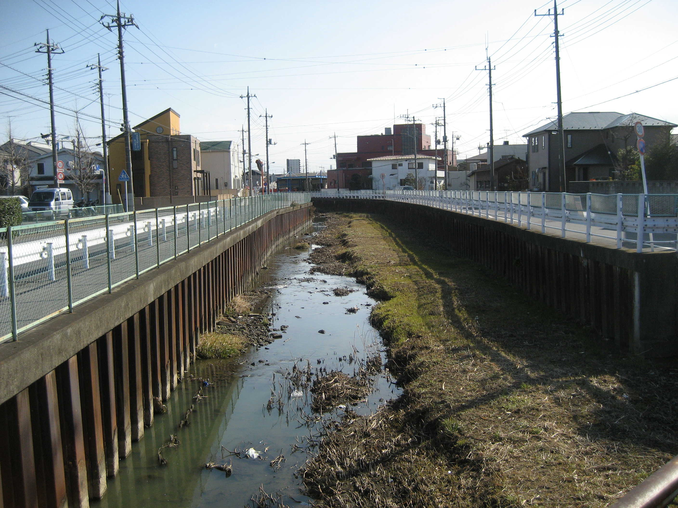 葛西用水（八潮市内）